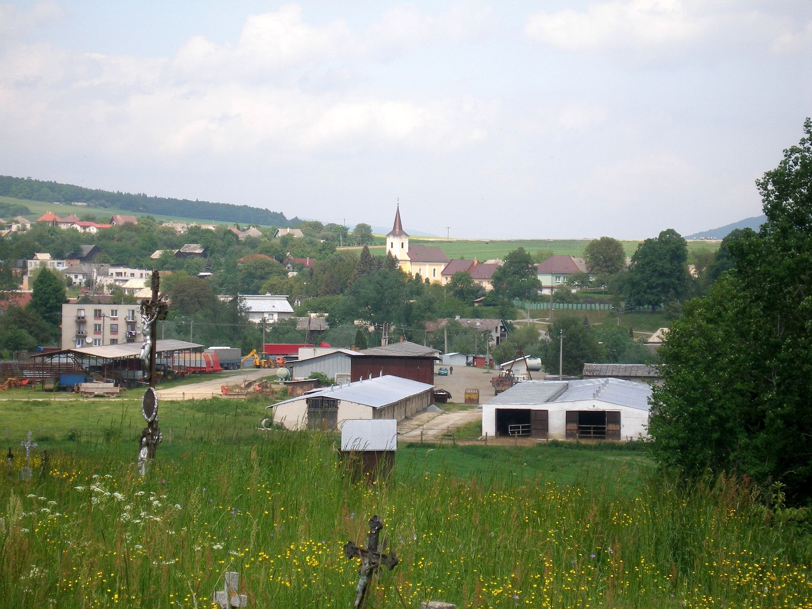 Obec Kojatice časť Šarišské Lužianky,okres Prešov, Šarišská vrchovina región Šariš